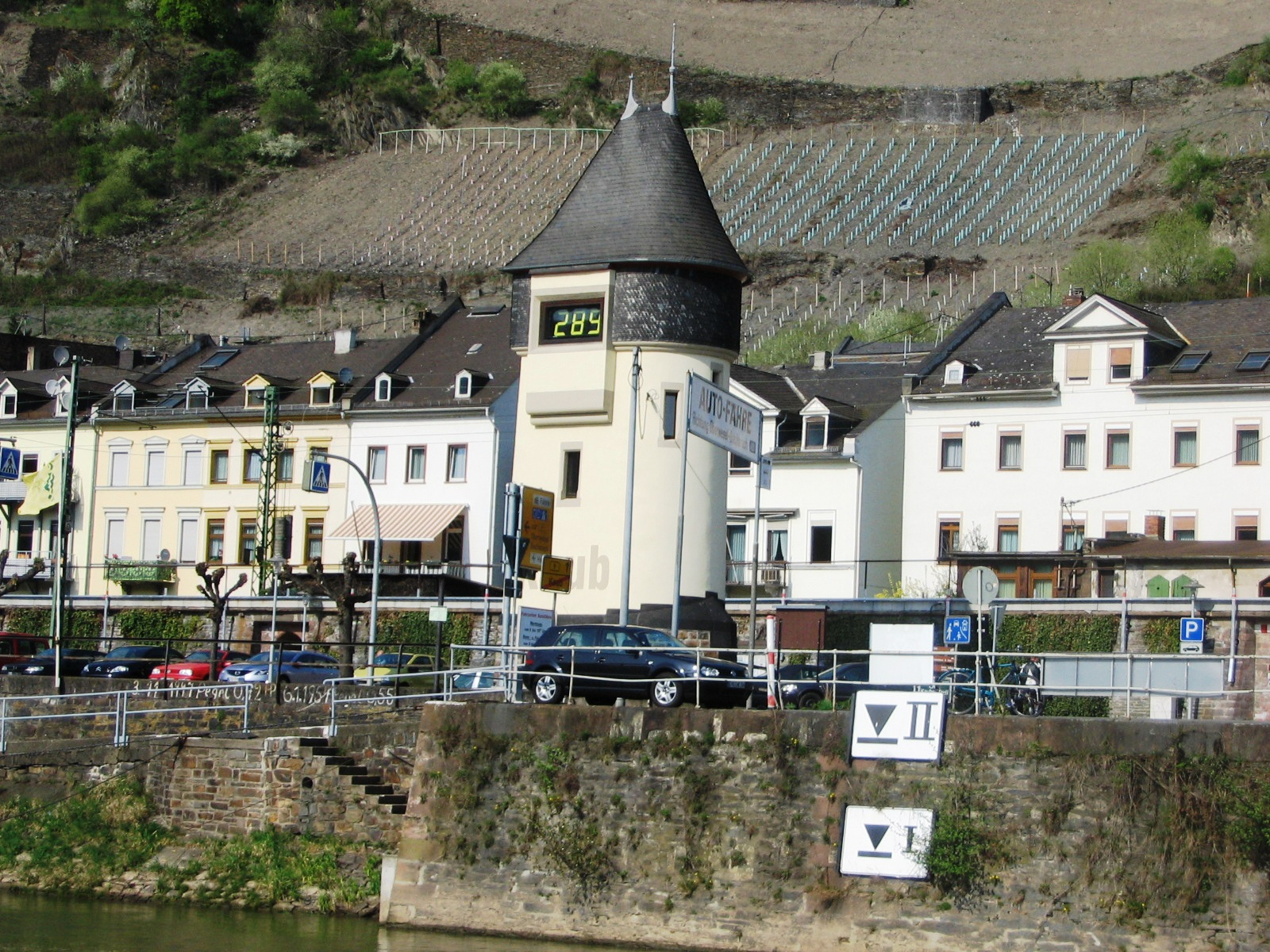 Rheinpegel Kaub mit Digitalanzeige des Pegelstands im Pegelturm. Die Hochwassermarken I und II sind an der Ufermauer zu sehen. Der Pegelnullpunkt liegt bei 67,66 m ü. NN, die Marke I bei Pegel 460 (72,26 m ü. NN) und die Marke II bei Pegel 640 (74,06 m ü. NN)